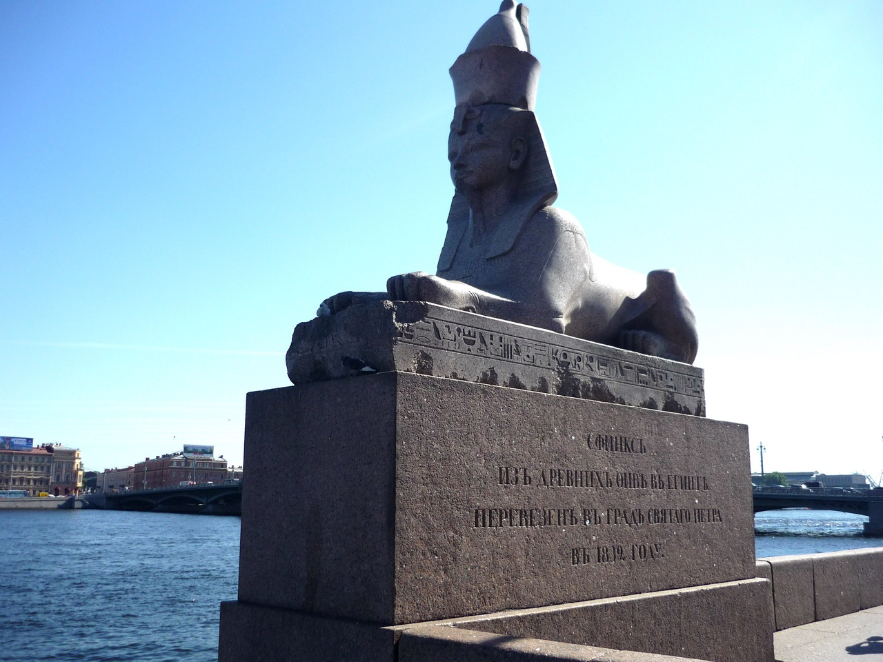 Сфинксы на Университетской набережной